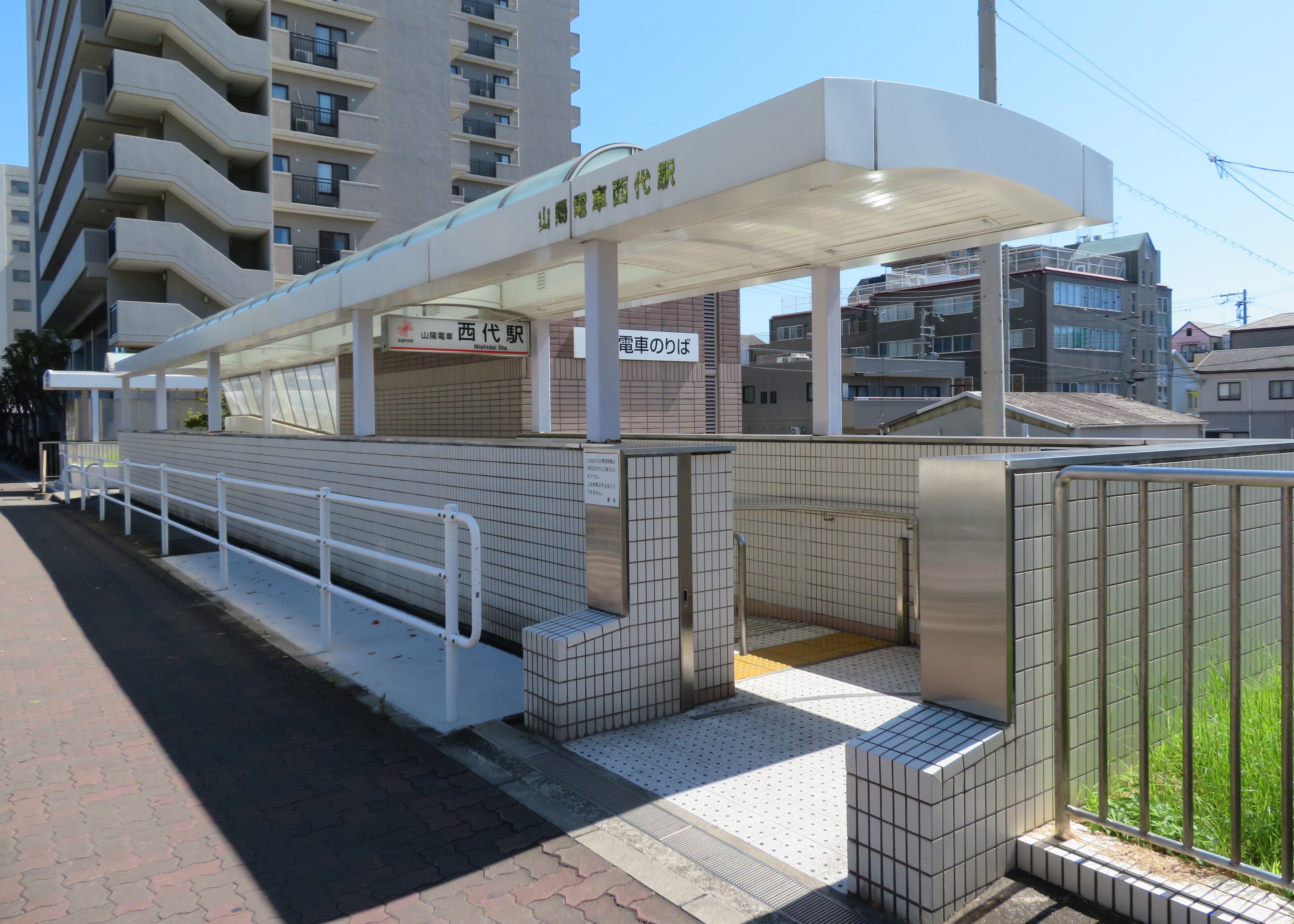 山陽電鉄西代駅